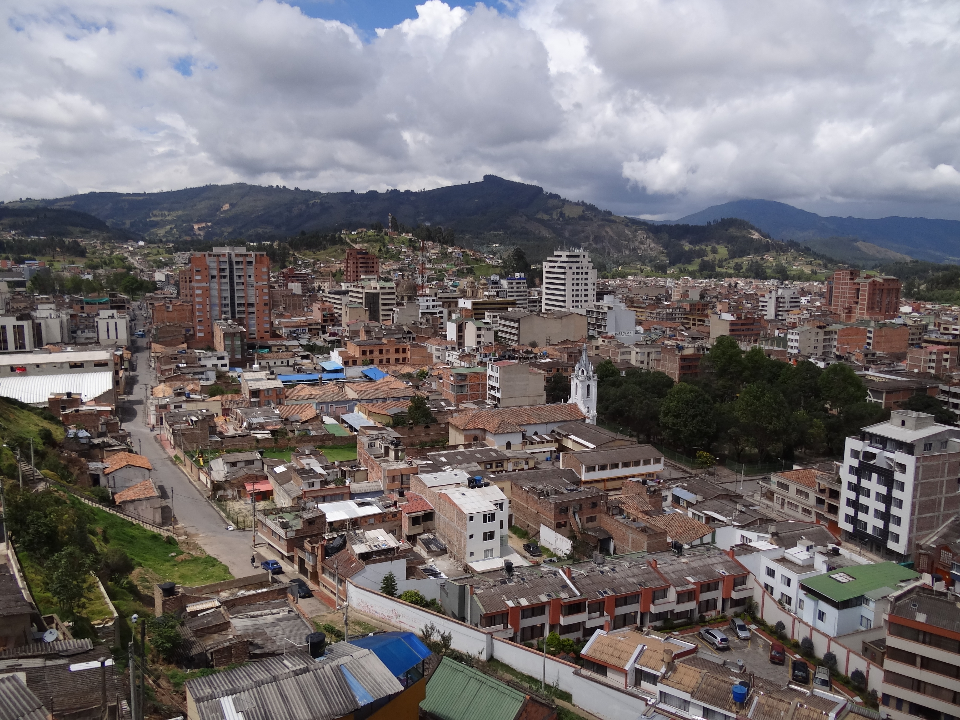 Detalle del centro de la ciudad de Duitama, departamento de Boyacá, Colombia